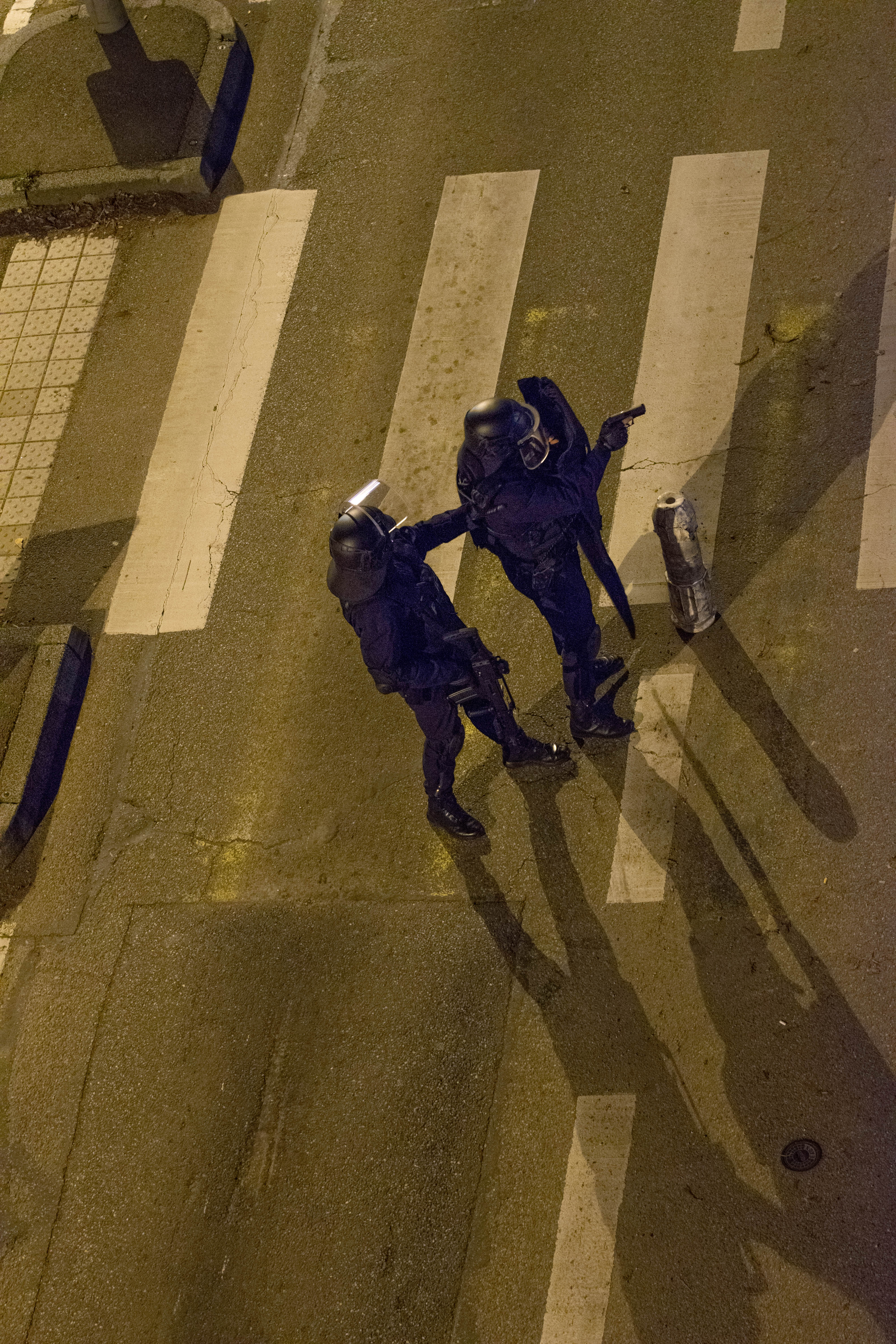 Intervention des services de police le soir de l'attentat à Strasbourg, 11 décembre 2018, route de l'hôpital.